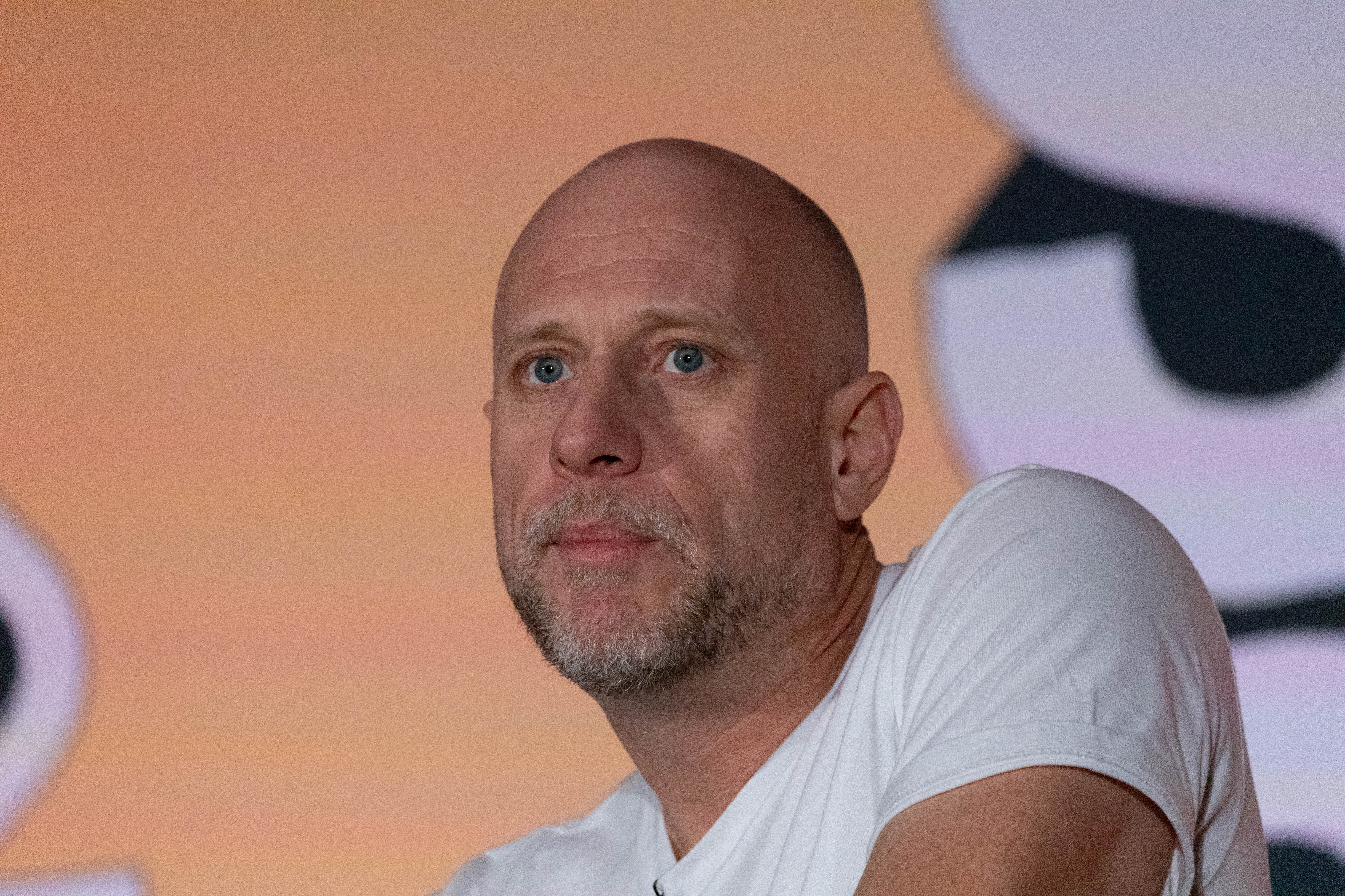 Photo: Ståle Grut / NRKbeta